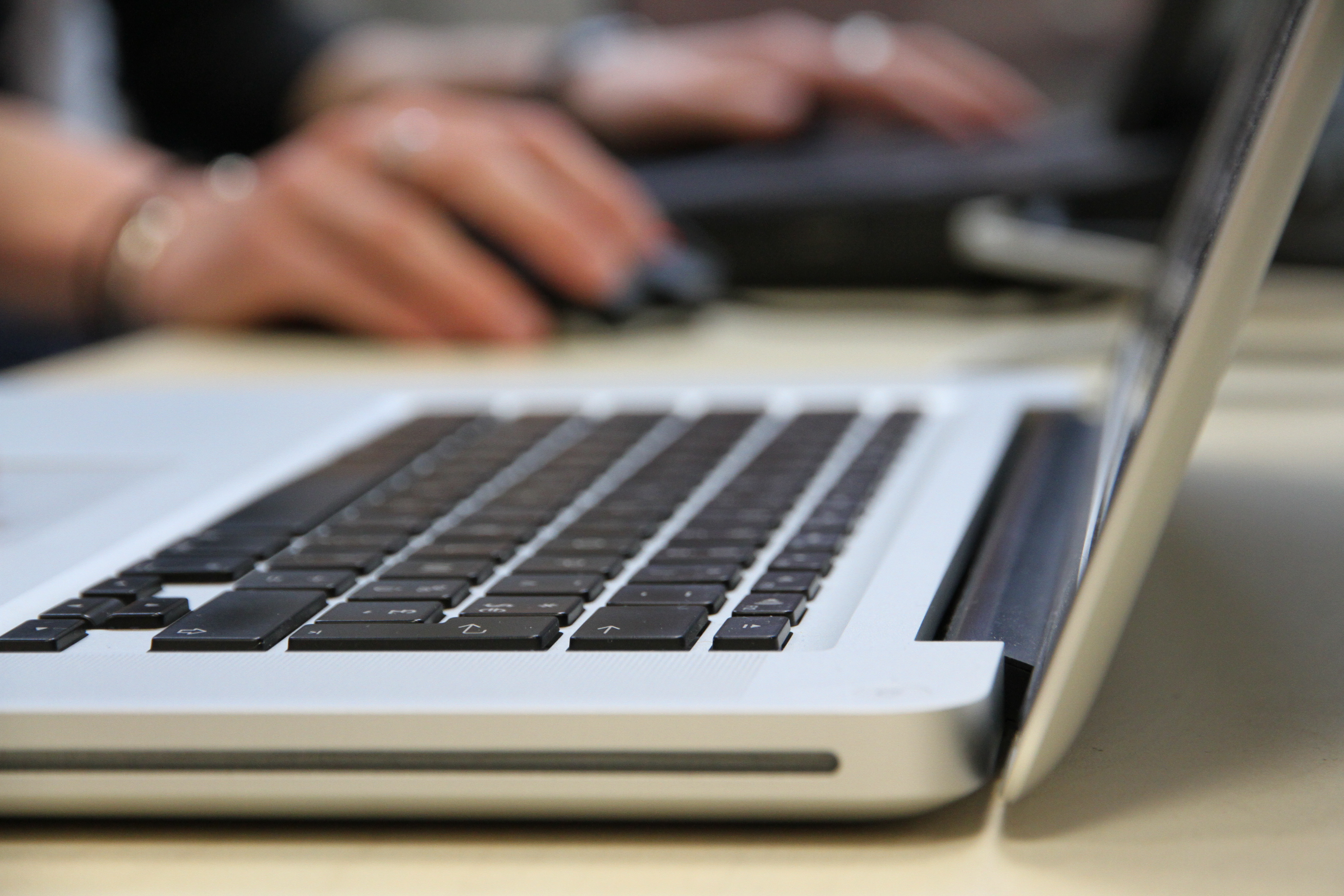 Clavier d'un ordinateur MacBook Pro Copyleft: This work of art is free; you can redistribute it and/or modify it according to terms of the Free Art License. You will find a specimen of this license on the Copyleft Attitude site as well as on other sites.